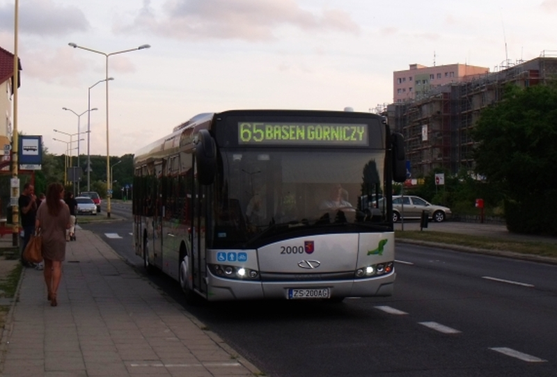 Solaris Urbino 12 Hybrid (#2000, nr rej. ZS 200AG) należący do SPA Dąbie.